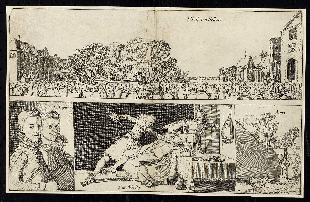 Fictieve titel. Titels binnen de afbeeldingen: 'T'Hoff van Hollant', 'Paris' en 'La Vigne', 'Van Welly' en 'Asput'. Volgens Hollstein naar Willem Buytewech door Esaias van de Velde (ca.1591-1630). Vier afbeeldingen op één plaat: Middenonder de moord op Jan van Wely (1 mei 1616). Middenboven het radbraken van diens moordenaars, Jan van Parijs en Jan De la Vigne, op het groene zoodje te 's-Gravenhage (16 mei 1616). Linksonder portretten van Van Parijs en De La Vigne. Rechtsonder het vinden van het lijk van Van Wely.